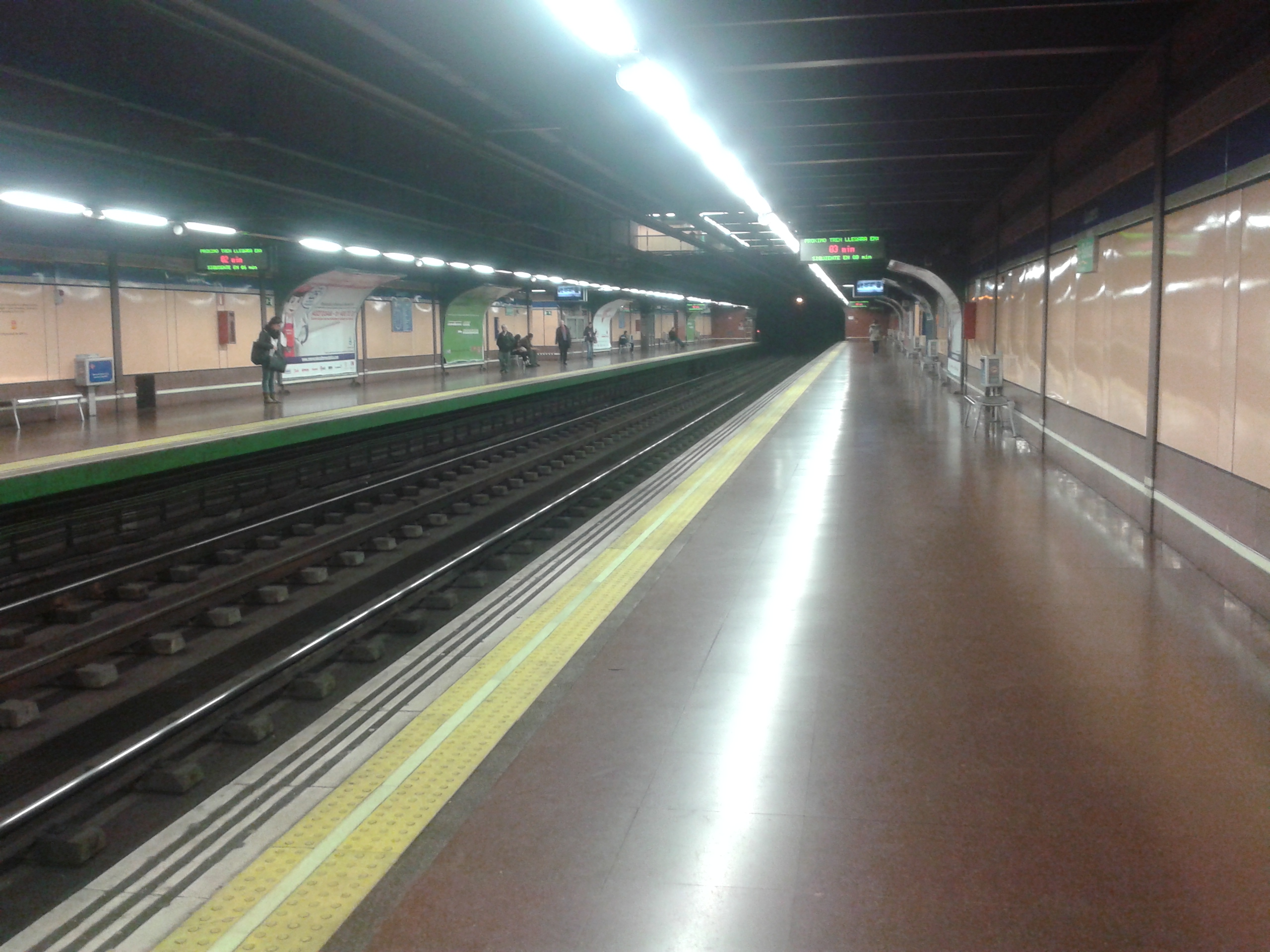 Estación de Lucero. Andenes de la línea 6 de Metro de Madrid.